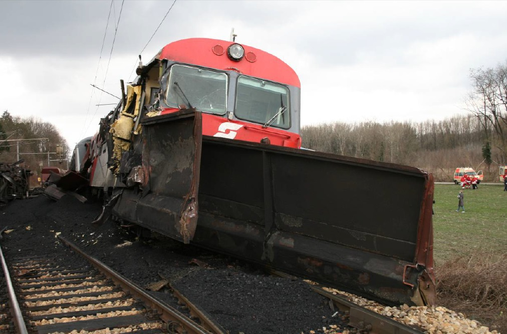 Am 29. März 2009 prallte im Bahnhof Kritzendorf an der Franz-Josefs-Bahn (Österreich) ein geschobener vierteiliger Wendezug seitlich in einen mit Kohle beladenen Ganzgüterzug. Durch die Kollision stürzten die letzten drei Wagen des Güterzugs um, der Steuerwagen entgleiste. 12 Personen wurden verletzt. Der Triebfahrzeugführer im Steuerwagen des CityShuttles überfuhr ein Halt zeigendes Ausfahrsignal. Der Steuerwagen war mit der Zugsicherung Indusi I 60 ausgerüstet. Die moderne Zugsicherung PZB 90 mit dem restriktiven Modus hätte die Kollision verhindert.